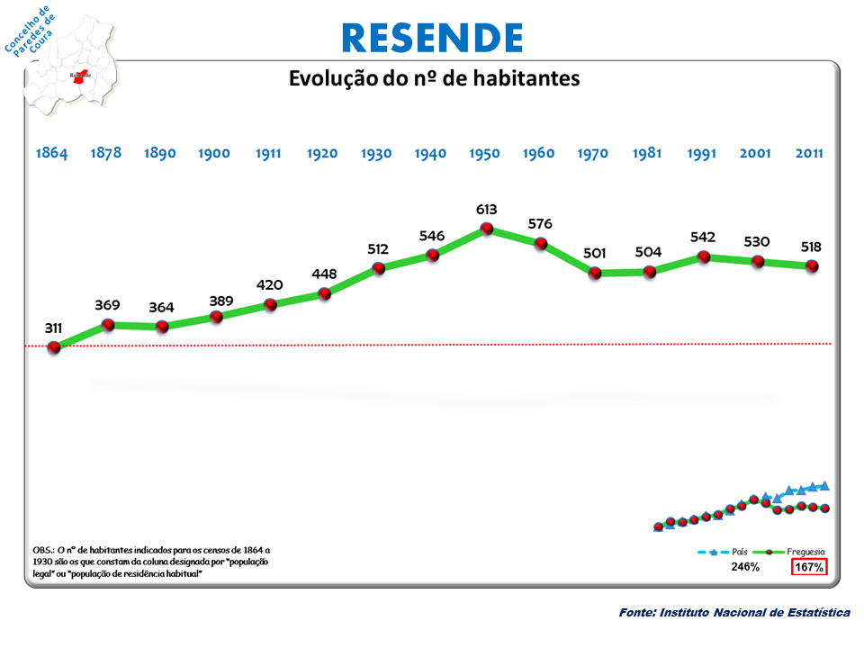 Censos 1864/2011